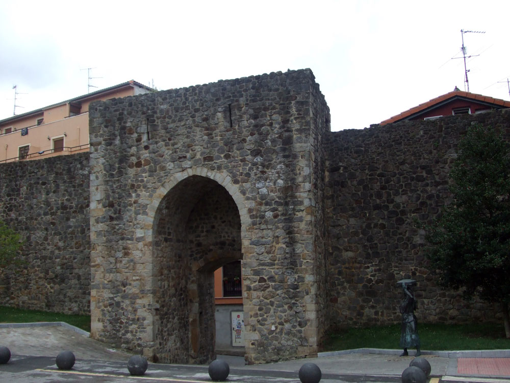 Cara exterior de la Puerta de San Juan.